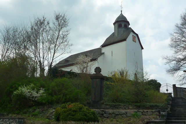 Evangelische Kirche in Großaltenstädten